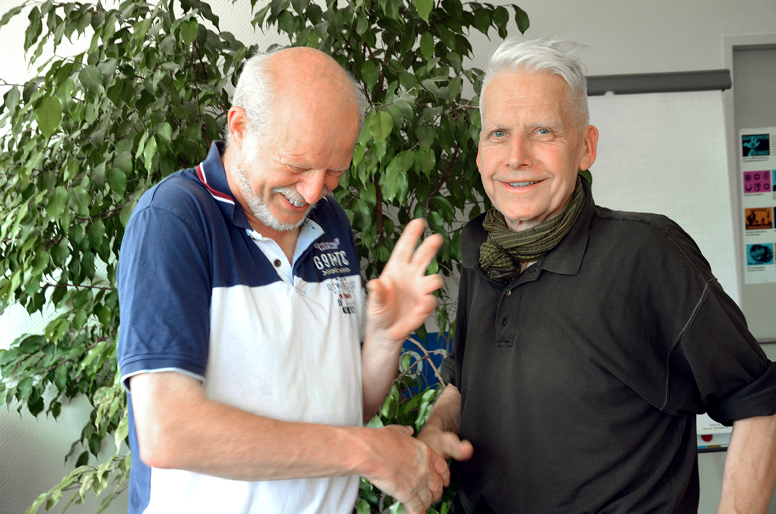 Haben gut lachen, weil köstlich amüsiert: Claus-Peter Enders (links) mit Prof. Dr. Rolf-Hermann Geller am 24. Juni 2016 im Wikipedia-Büro Hannover ...